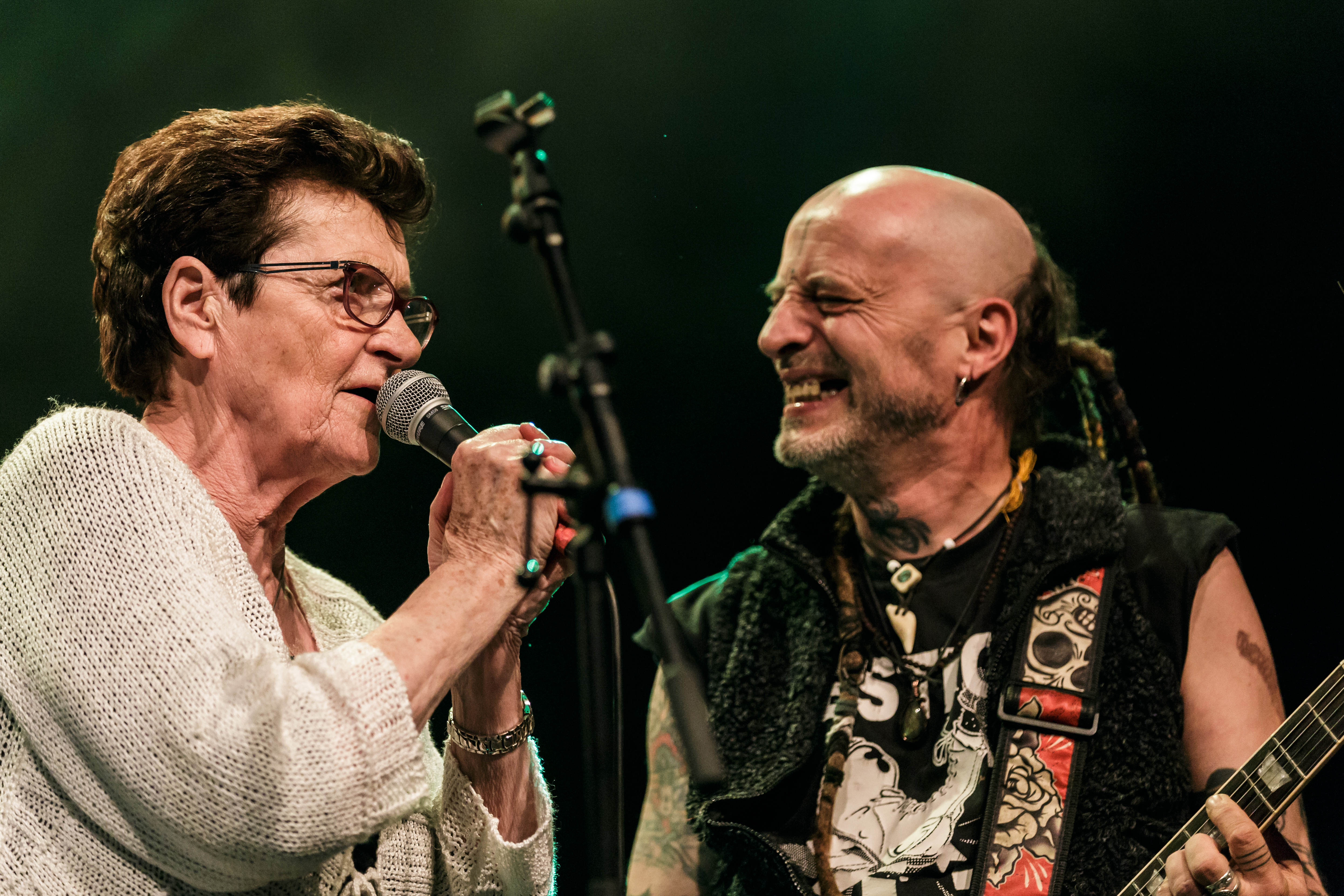 Les Ramoneurs de menhirs et la chanteuse Louise Ebrel en fest-noz au parc des expos de Penvillers à Quimper à l'occasion des 50 ans de la confédération des cercles War'l Leur le 29 avril 2017.